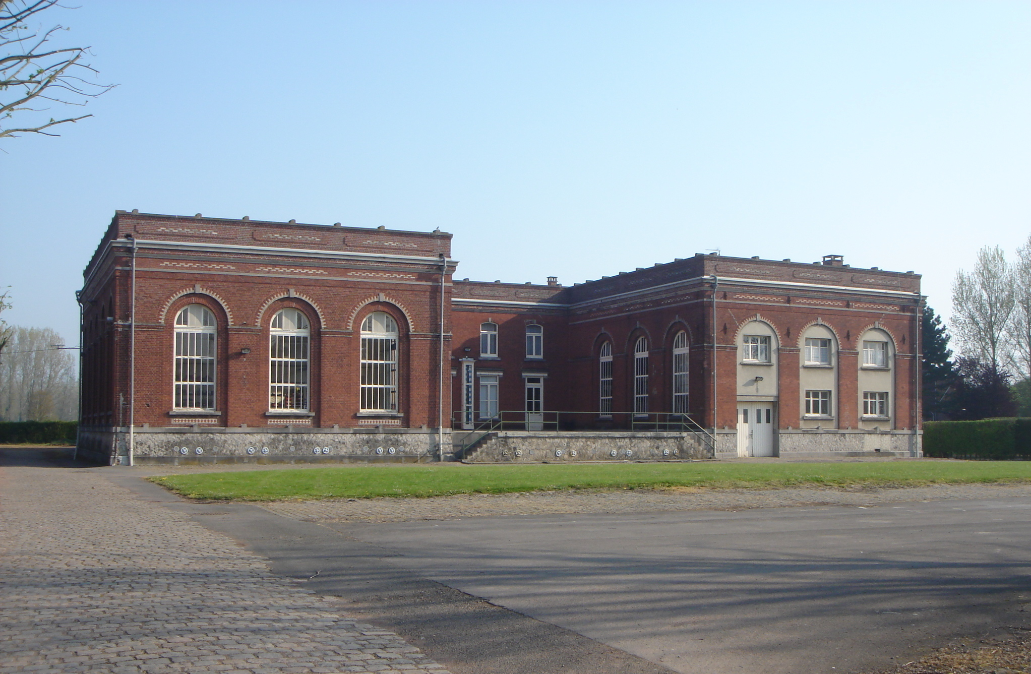 Pecquencourt usine Production eau